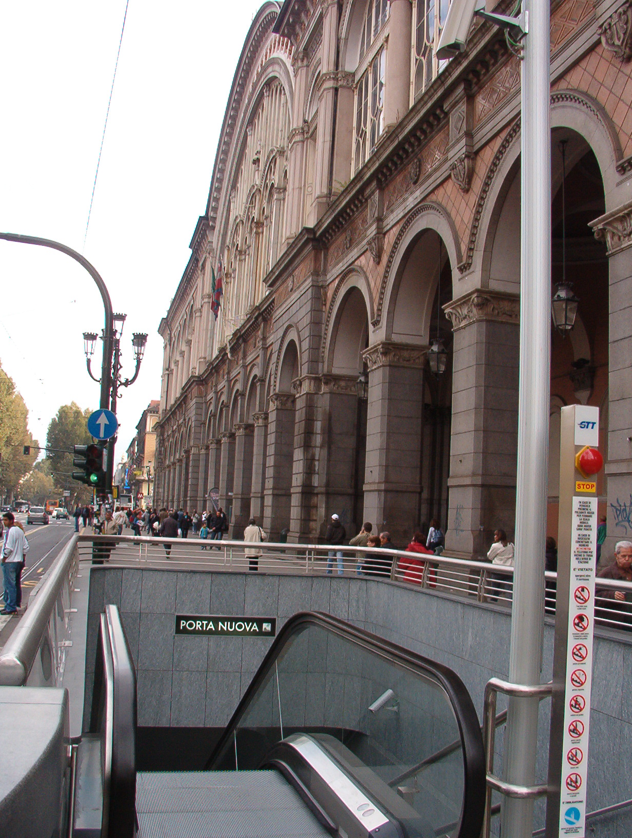 accesso alla stazione di Porta Nuova della metropolitana di Torino - Italy